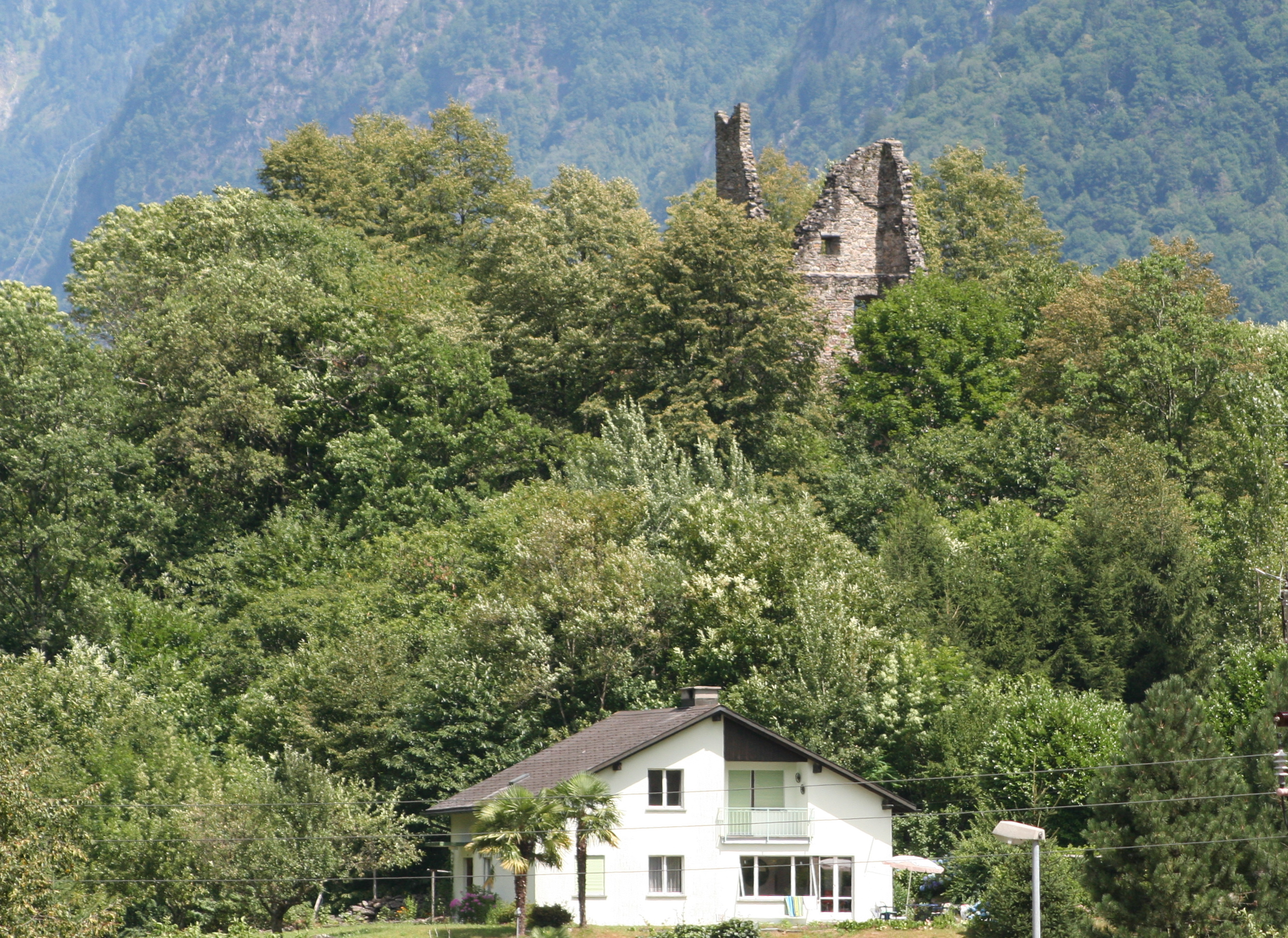 Ruine Norantola: Lage